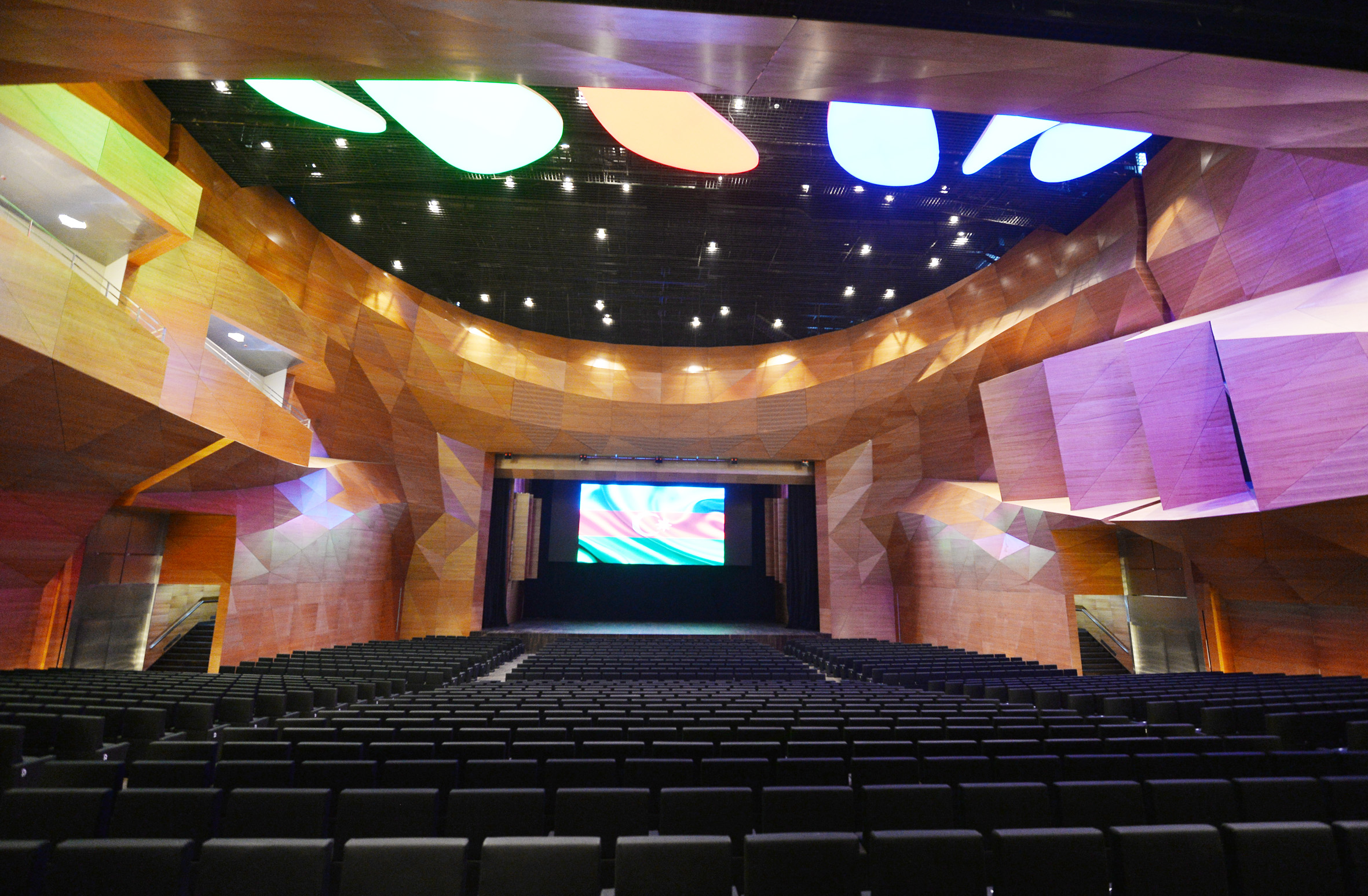 Baku Congress Center